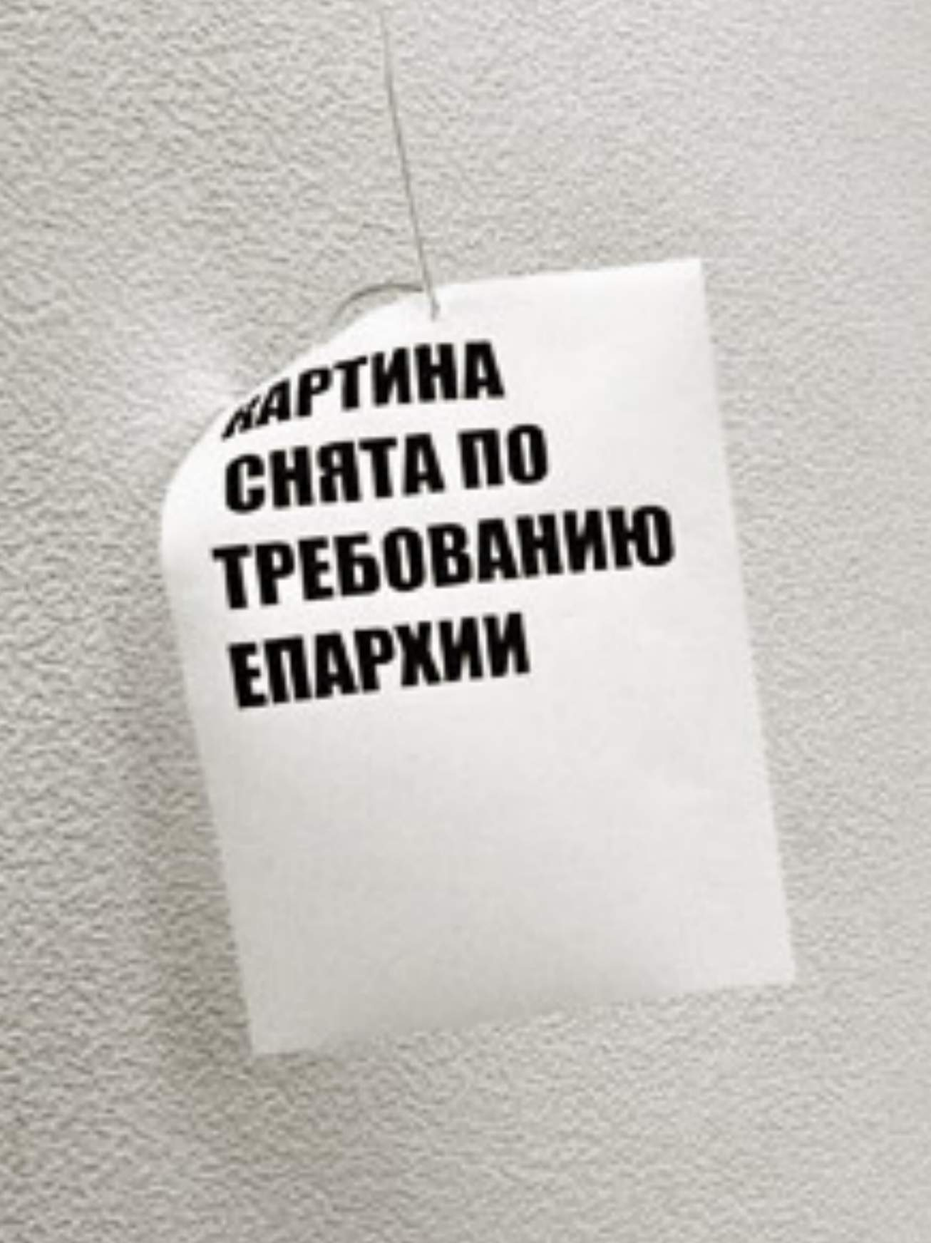 Объявление на месте снятой с выставки "Искусство или смерть. Двадцать лет спустя" картины А. Сигутина и В. Анзельма